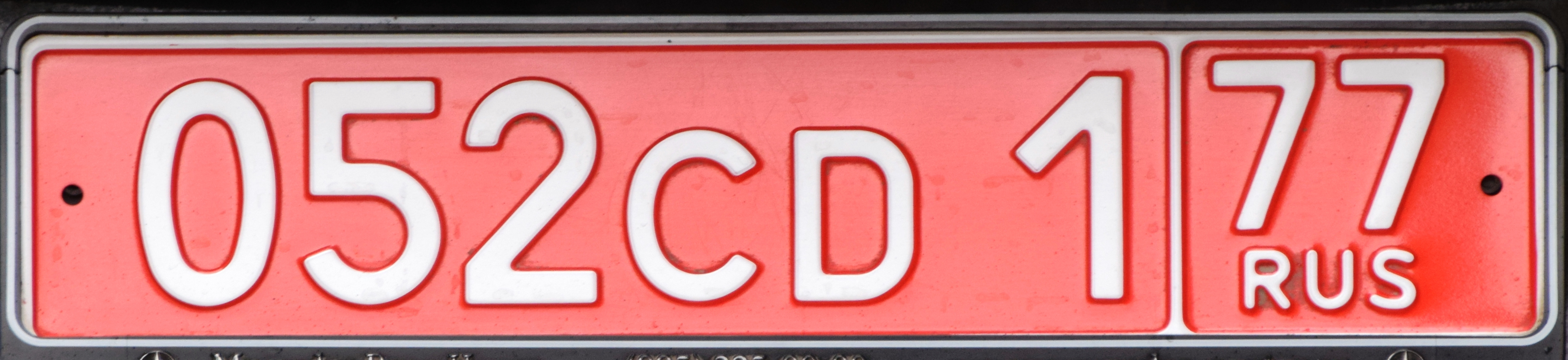 Nepalese ambassadeur kentekenplaat in Rusland